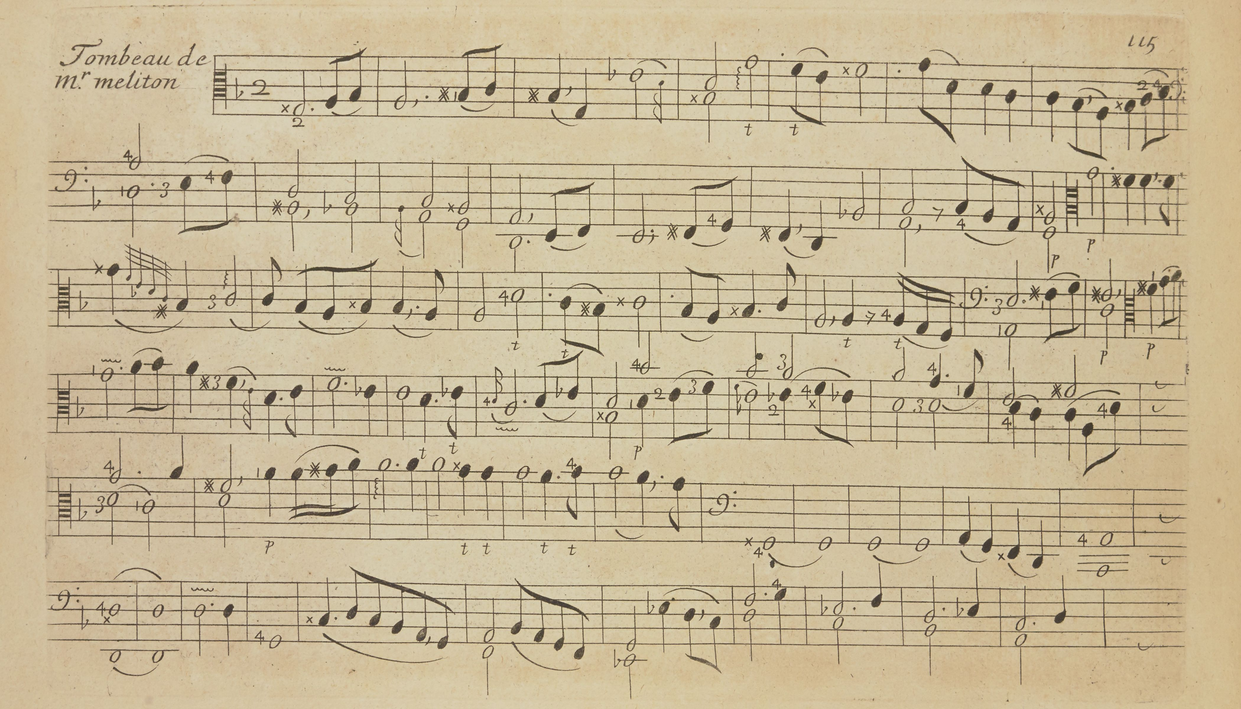 Marin Marais - Tombeau de Mr Méliton (1689), p. 115